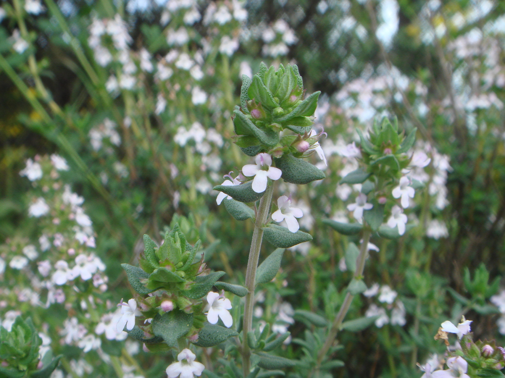 Thymus maroccanus, Ceuta, España.